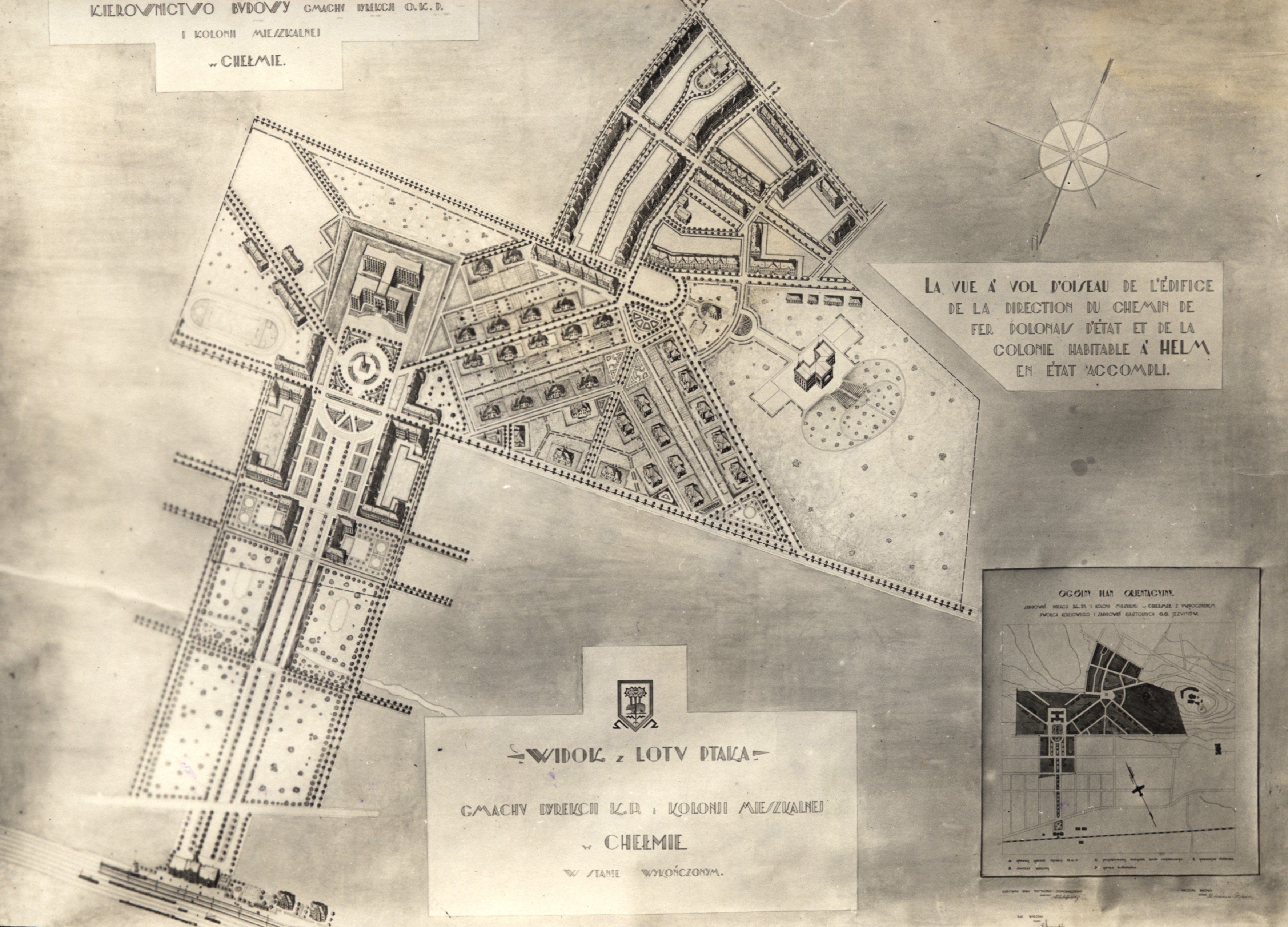 Chełm Dzielnica Nowe Miasto 1926 - fotografia przedstawia zrealizowany w latach 1928-32 fragment planów budowy nowej dzielnicy - plac budowy Gmachu Dyrekcji OKP i kolonii mieszkalnej dla pracowników DOKP (Wschodniej Dyrekcji Okręgowej Kolei Państwowych) - fotografia z najprawdopodobniej z roku 1932 w zbiorach BCWBP w Lublinie [sygn. 1874/II]